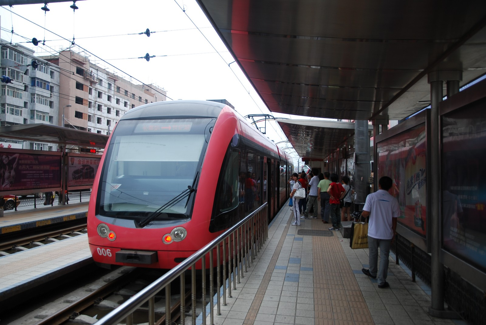 长春轻轨3号线长春站-2010.7